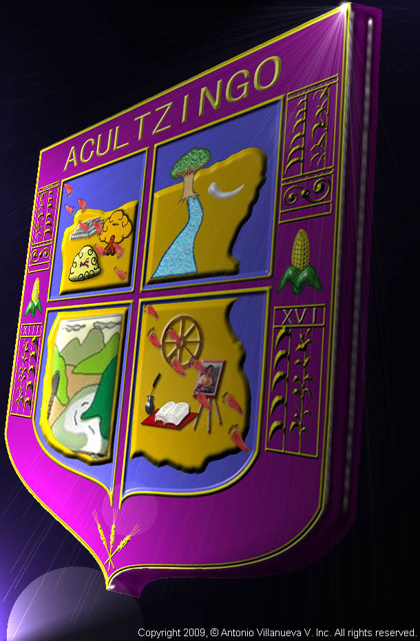 Escudo de armas del municipio de acultzingo diseñado por Studios VIVa en Tecamalucan veracruz